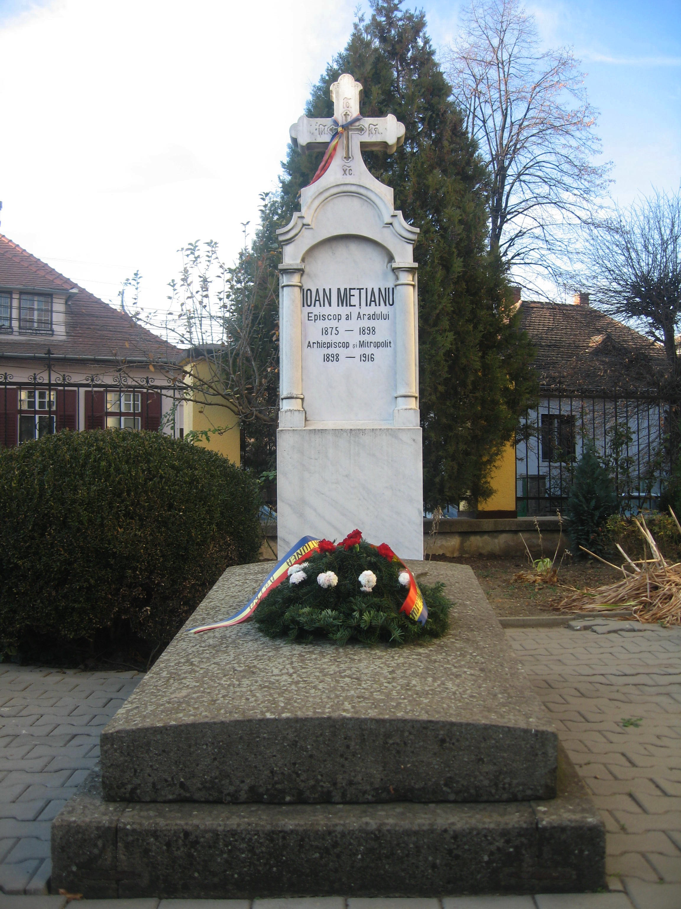 Ioan Mețianu ; Cimitirul bisericii "Buna Vestire” - din Groapă din Sibiu 03